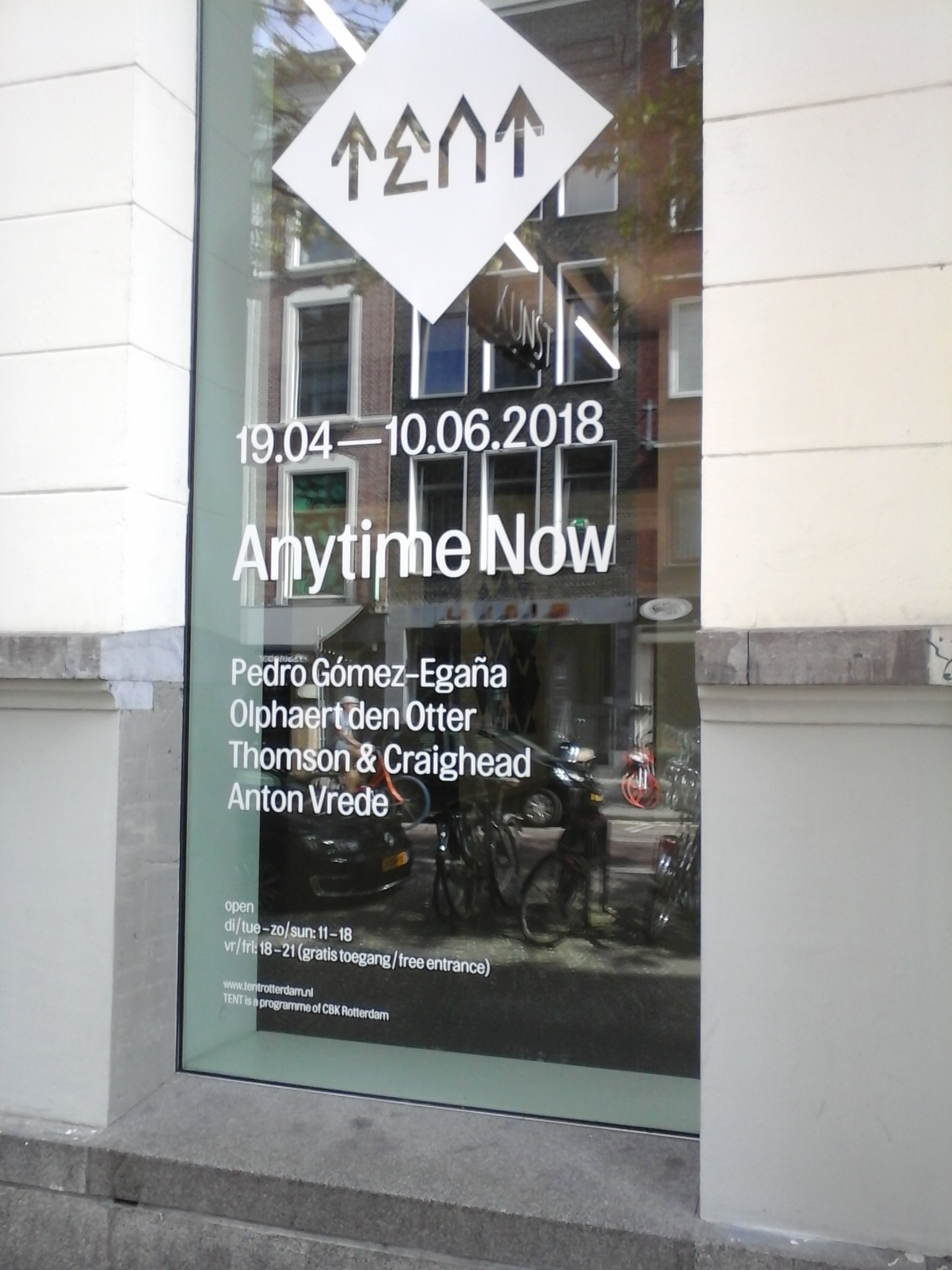 TENT Expositie Anytime Now, 2018